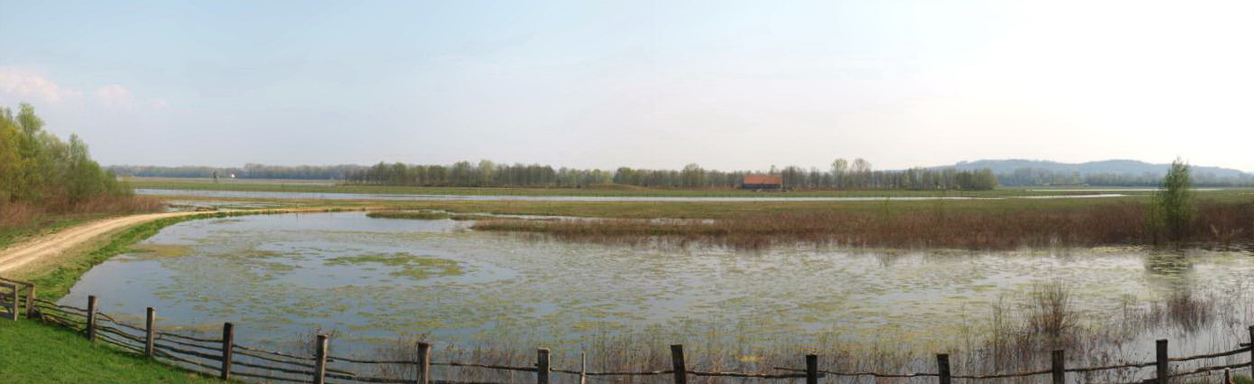 Zaštićeni par prirode Gajna u selu Oprisavci, Brodsko-posavska županija.